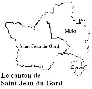 Le canton de Saint Jean du Gard Image personnelle